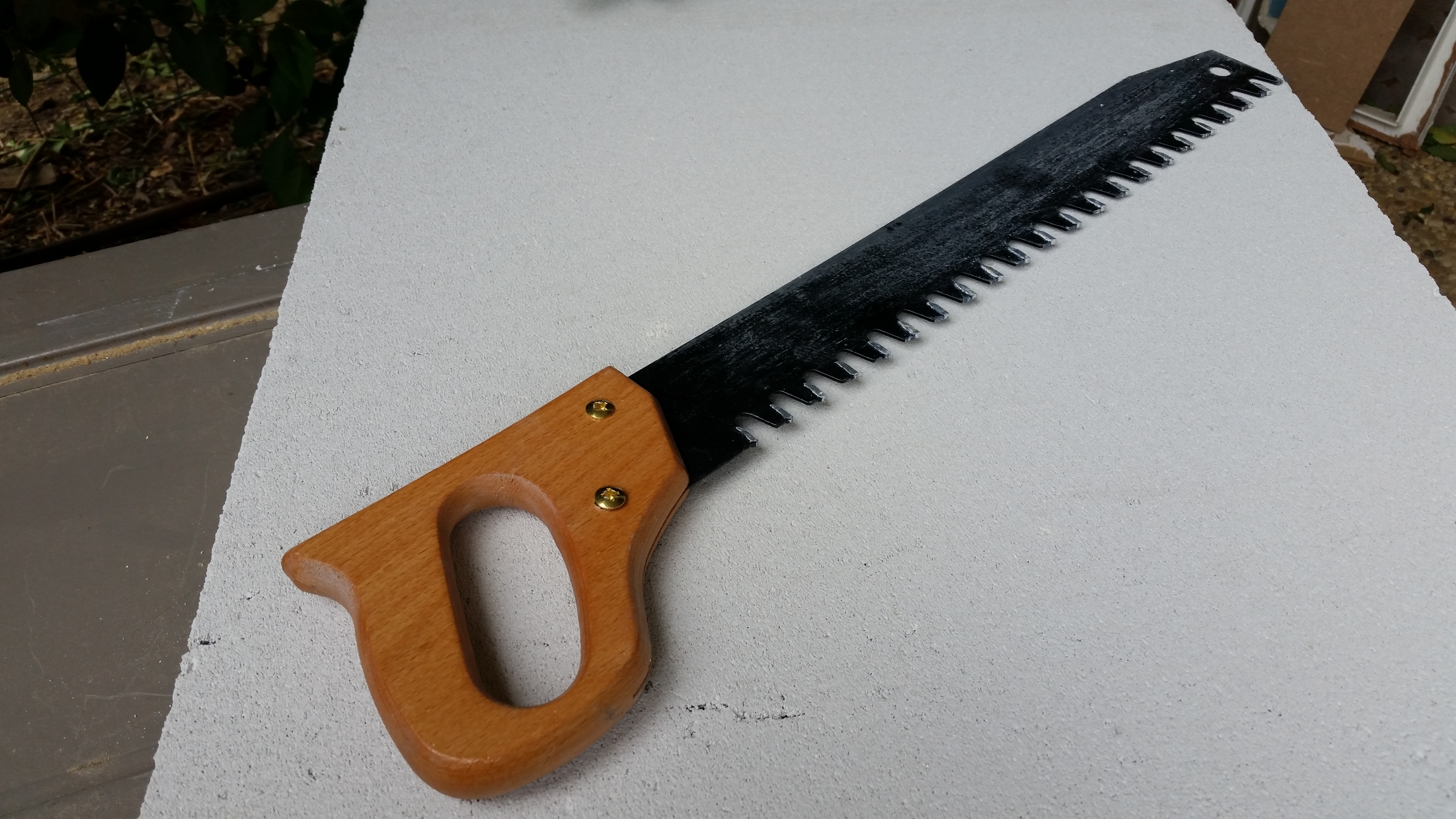 Scie à denture spécifique pour béton cellulaire